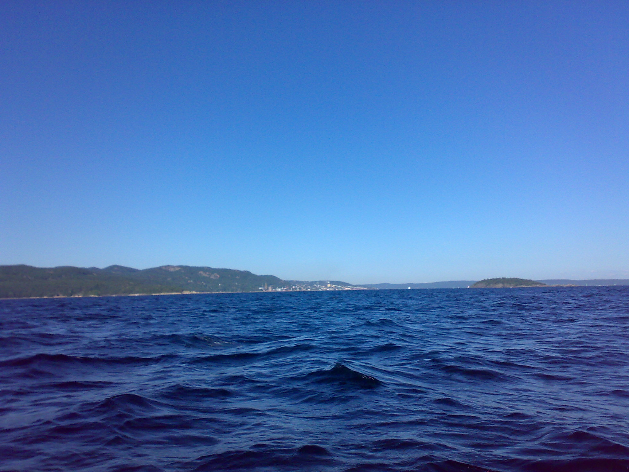 Tofte (Hurum) seen from Breiangen